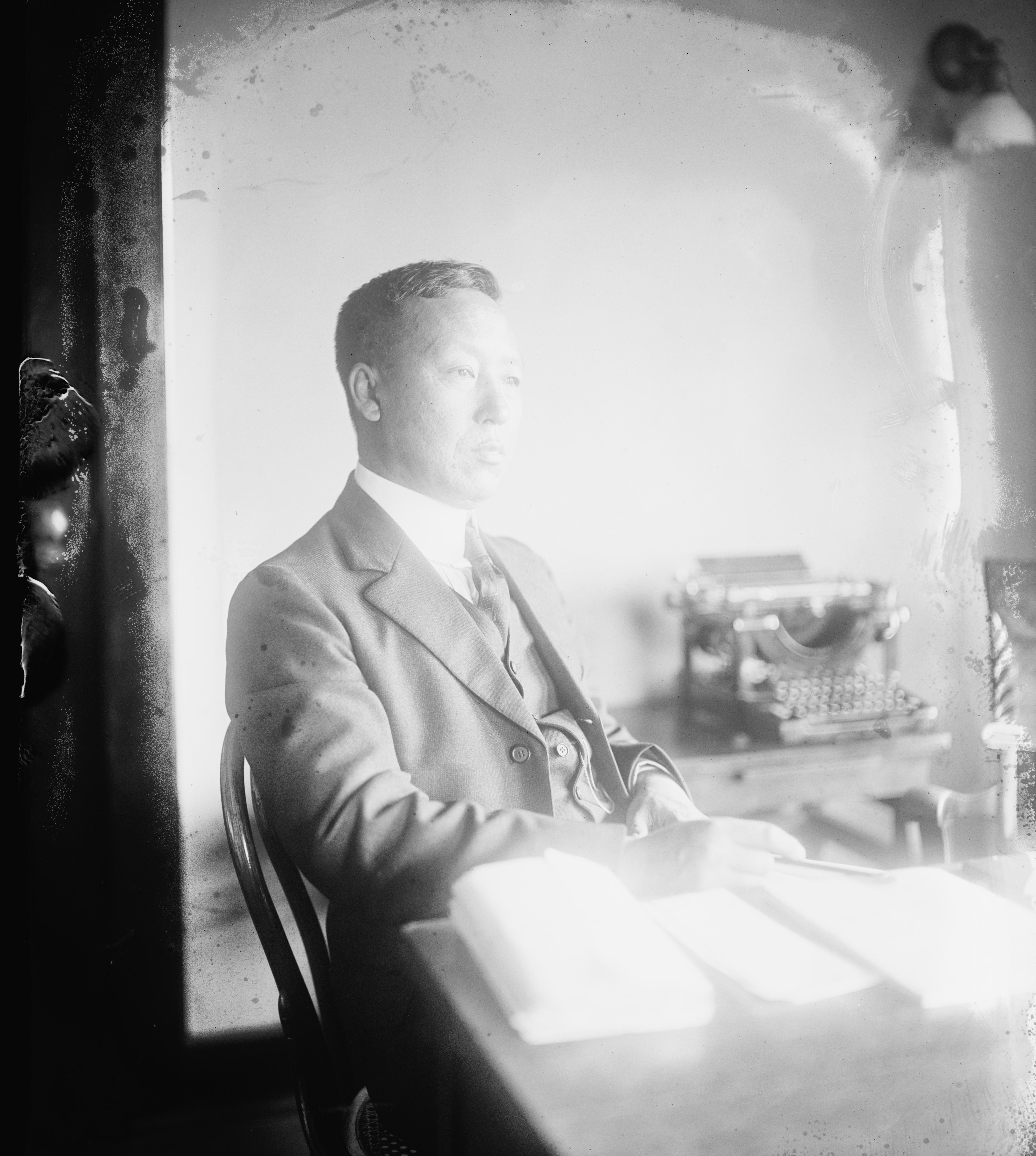 Syngman Rhee